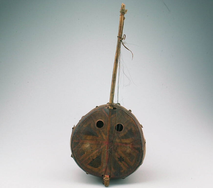 Het klanklichaam van deze eensnarige strijkluit (vedel) is gemaakt van een halve kalebas die met kamelenhuid is bespannen. Het leer heeft 2 klankgaten, en is met geometrische motieven versierd. Het is een zg. 'spiesluit': de hals gaat door het klanklichaam heen en komt er aan de andere kant weer uit. De snaar van paardeharen kan door middel van een bandje om de hals gestemd worden. Dit instrument wordt meestal door vrouwen bespeeld. (Mogelijk hoort strijkstok no. 2580-18 bij deze vedel.)